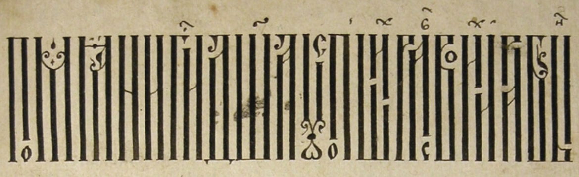 Надпись из «Каллиграфического подлинника» 1604 года: «Помяни, Господи, душа усопших раб Своих и рабынь». «Каллиграфический подлинник» создан в Сольвычегодске по заказу Никиты Строганова. Писец Фёдор Басов. Содержит образцы старопечатных инициалов, заставок, маргинальных украшений, уставного и полууставного письма, каллиграфические композиции, похожие на арабо-персидскую вязь, именные каллиграфические «таблетки» (вписанные в окружность надписи с именем патрона, Никиты Строганова).